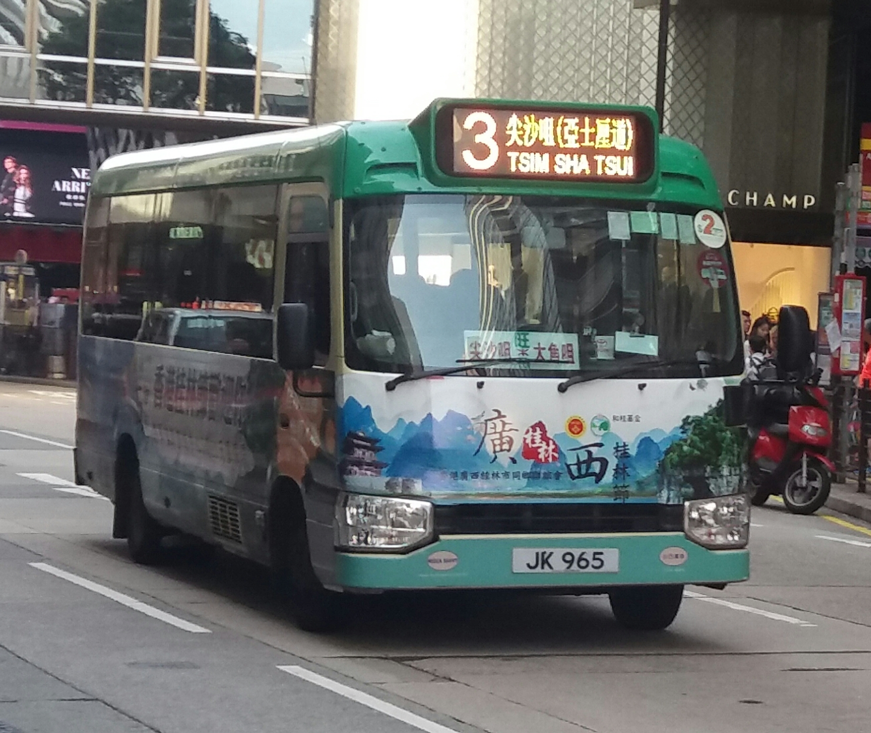 中文（香港）: 九龍專線小巴3號線，正途經廣東道前往尖沙咀總站